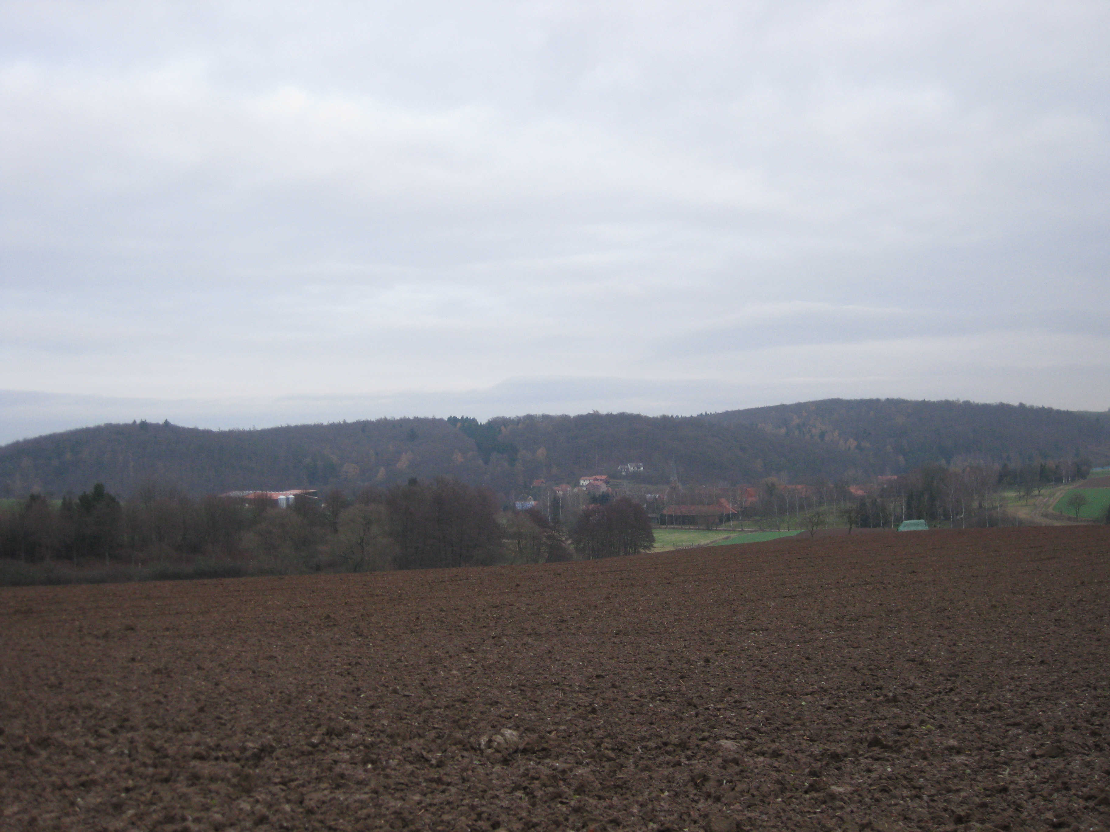 Etzenborn von Westen gesehen (im Hintergrund der Mühlberg (li) und Hunholzberg (re am Übergang zum thüringischen Pfaffenberg)